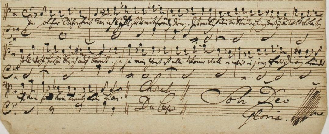 Johann Sebastian Bach unterschrieb seine Kompositionen oft mit Soli Deo Gloria (Gott allein die Ehre)